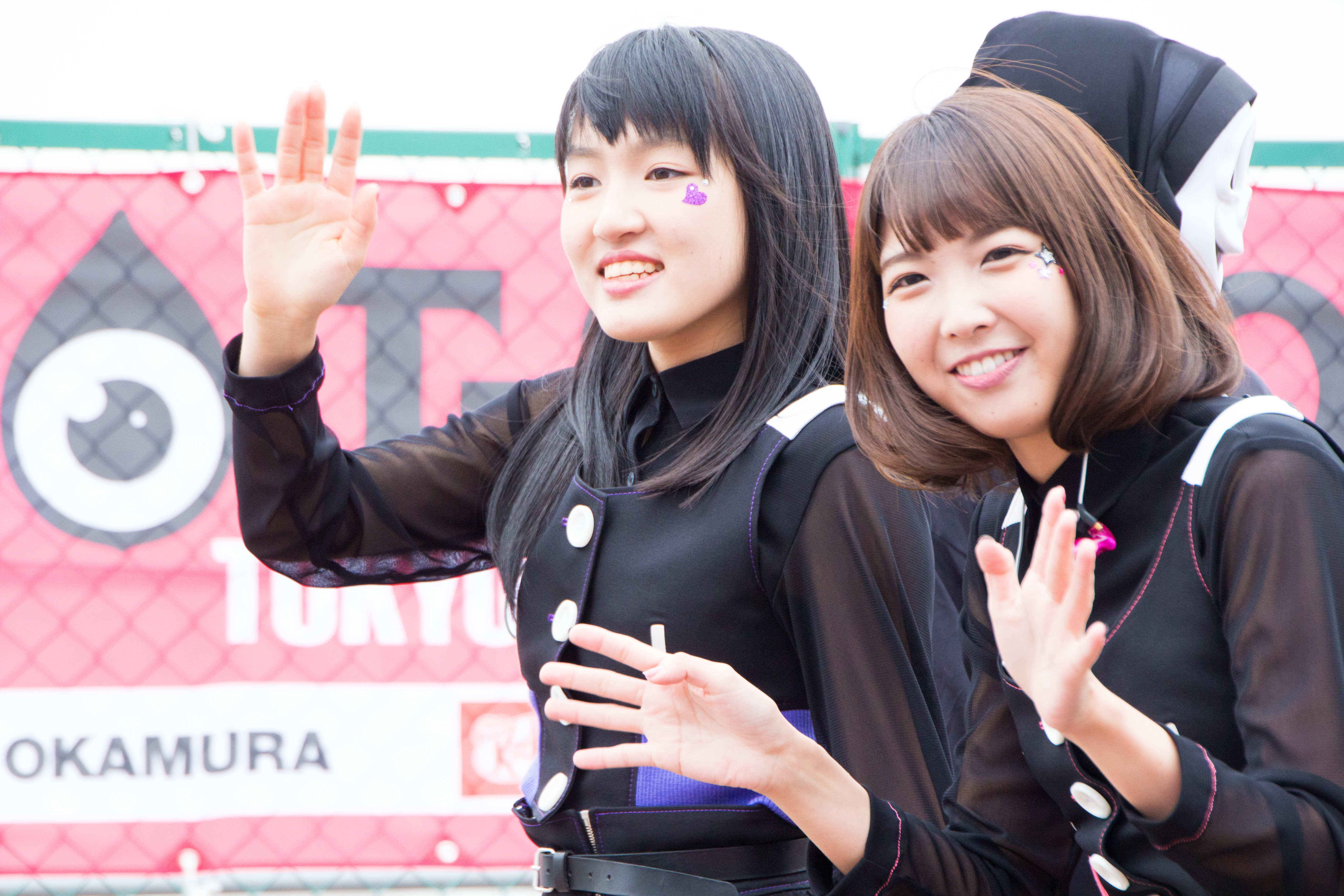 T-SPOOK 2016 小清水亜美 西田望見 (ワルキューレ)